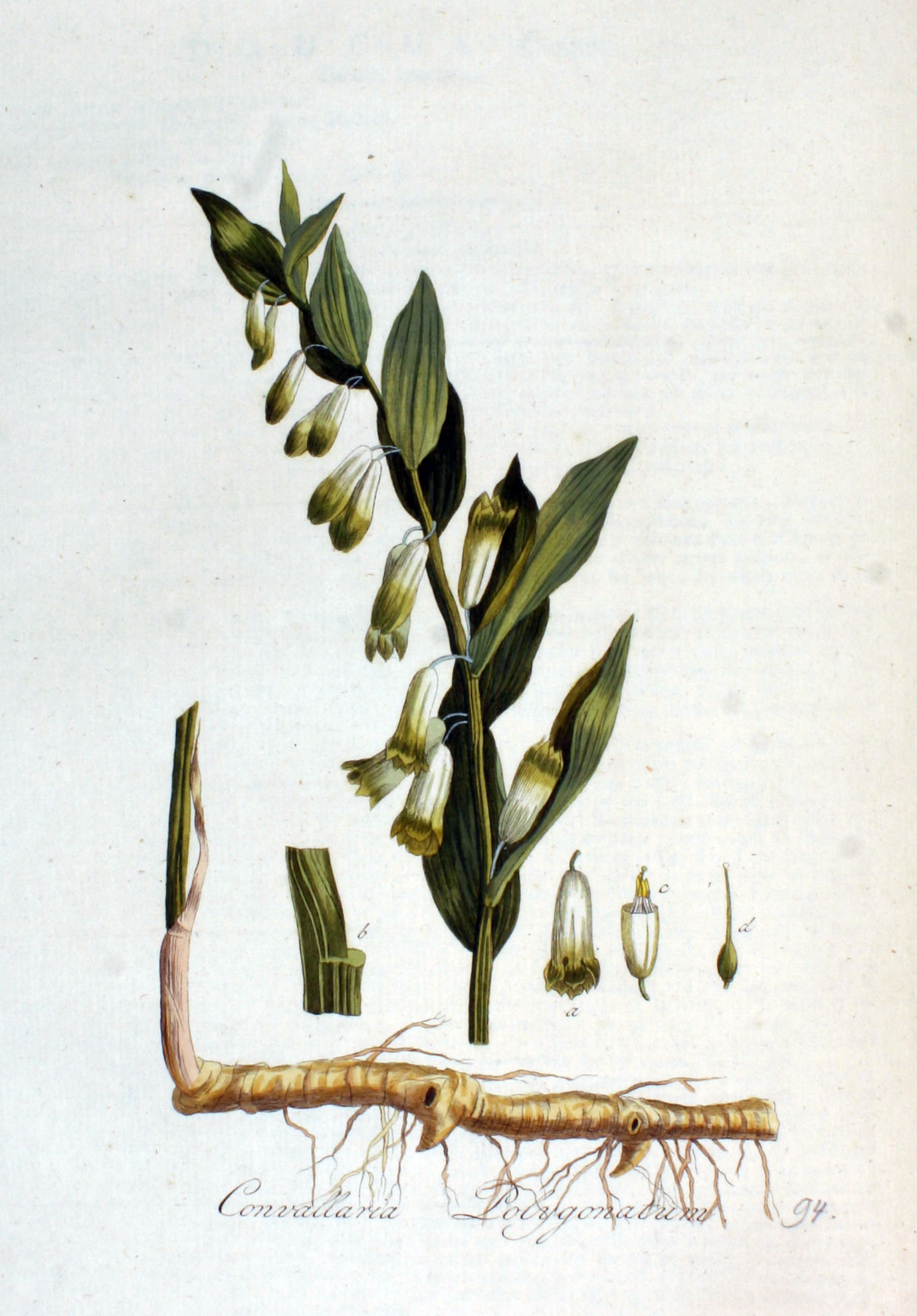 Polygonatum odoratum (Mill.) Druce (Syn. Convallaria polygonatum L.)